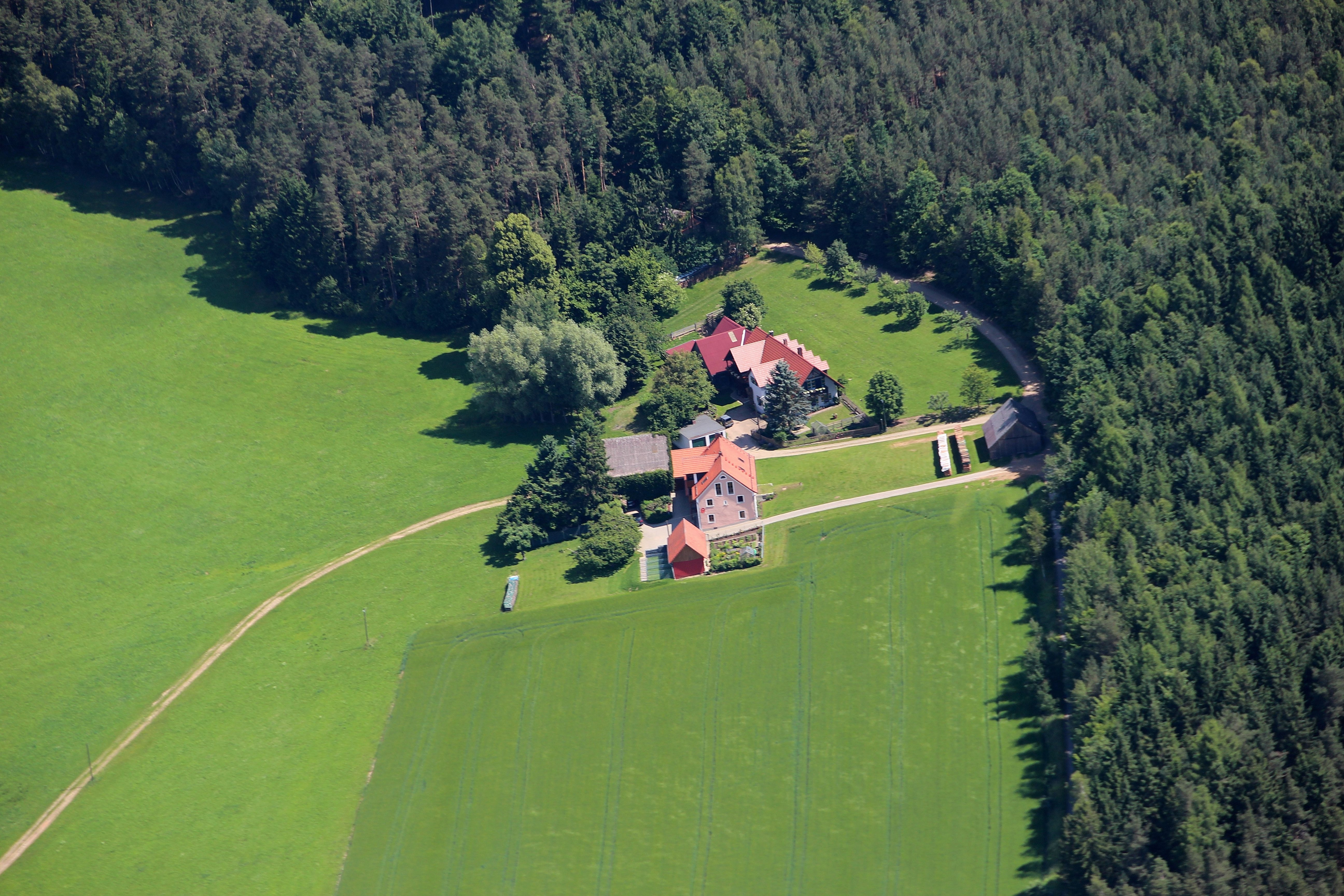 Heilinghäusl ist ein Ortsteil der Gemeinde Gleiritsch, Landkreis Schwandorf, Oberpfalz, Bayern.